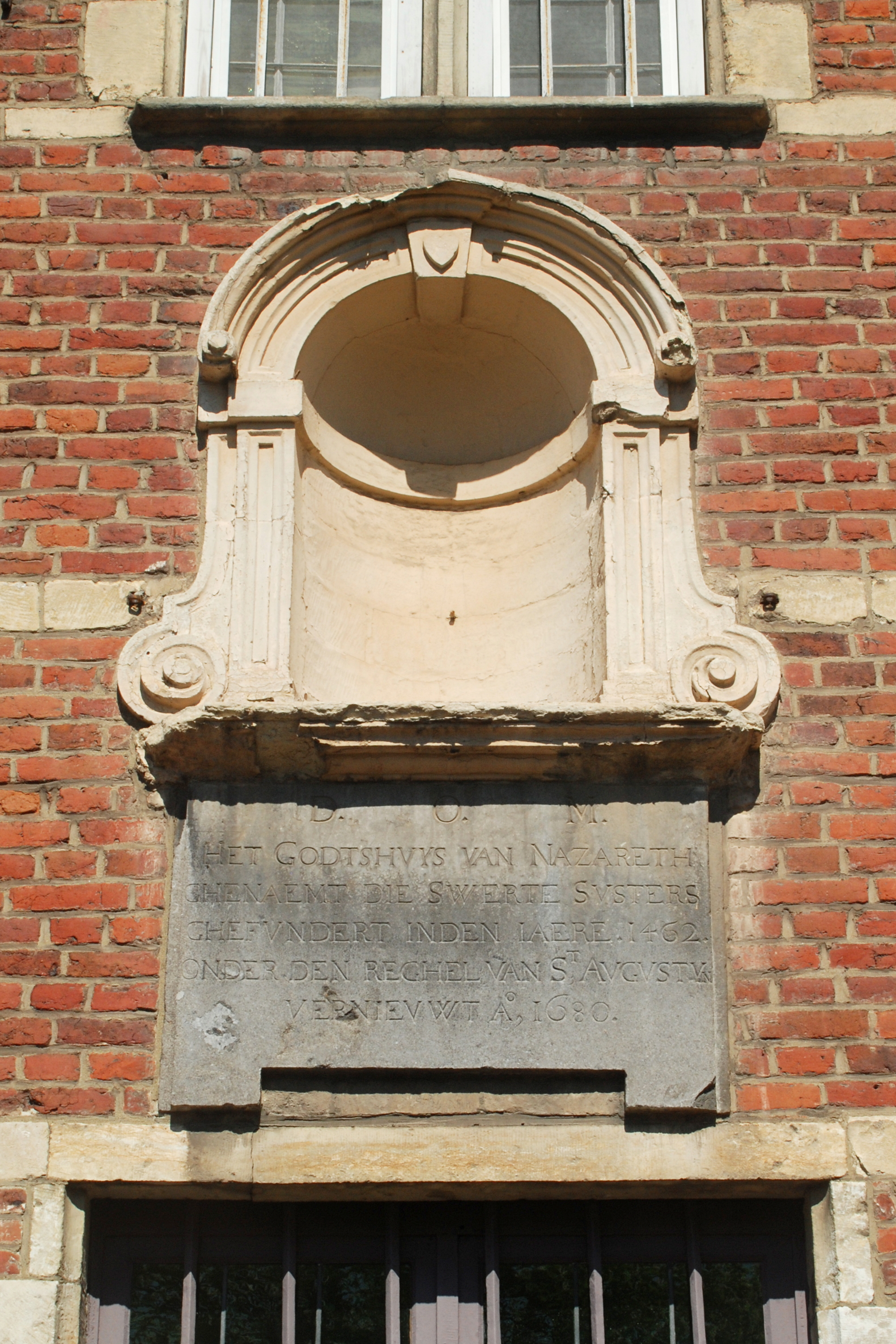 Belgique - Brabant flamand - Louvain (Leuven) - Chapelle des Sœurs Noires (Zwartzusterskapel)